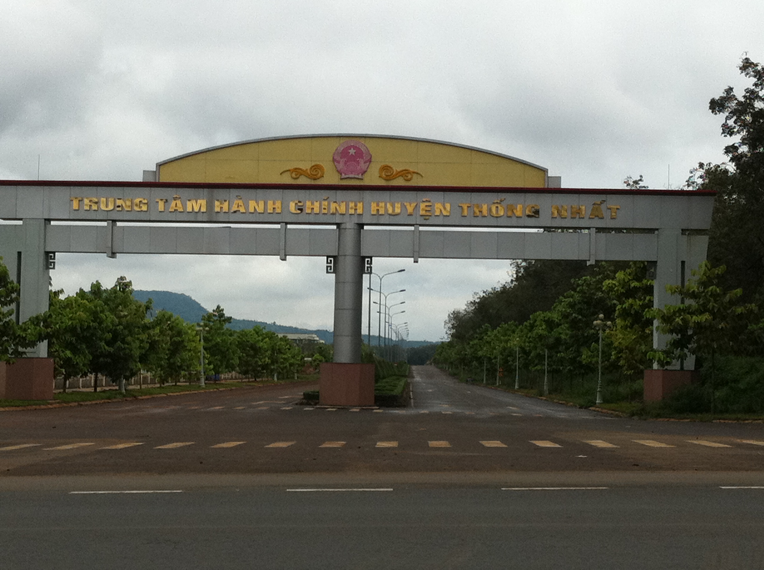 Cổng vào trung tâm hành chính huyện Thống Nhất